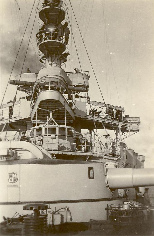 Linienschiff Schleswig-Holstein - Kommandoturm 1929